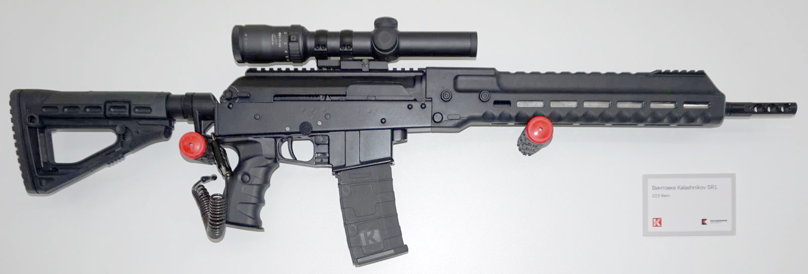 самозарядный спортивный карабин для практической стрельбы Kalashnikov SR-1, показанный на выставке "Армия-2017".